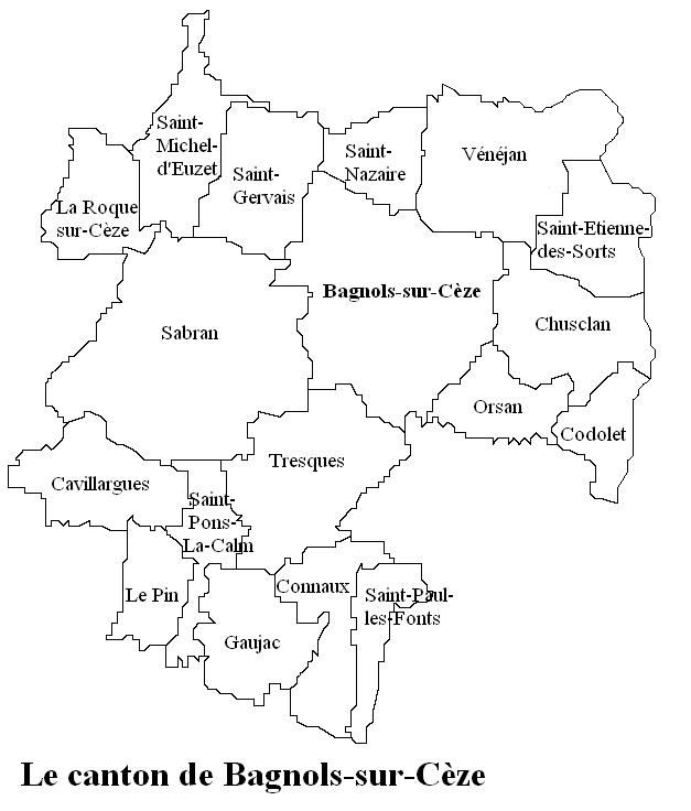 Le Canton de Bagnols-sur-Cèze Image personnelle